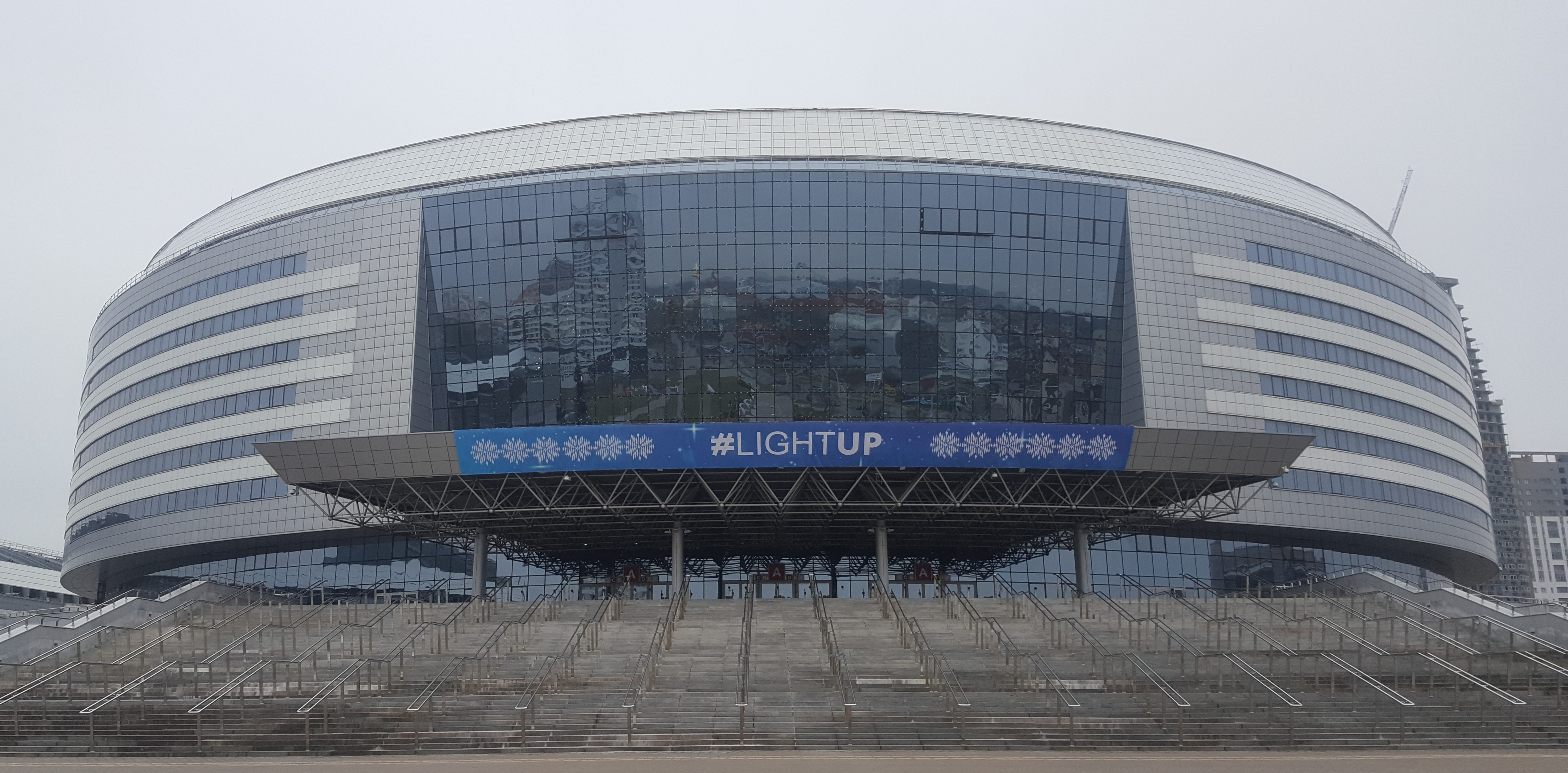 Hala Mińsk Arena przed 16. Konkursem Piosenki Eurowizji dla Dzieci w Mińsku, 24 listopada 2018.